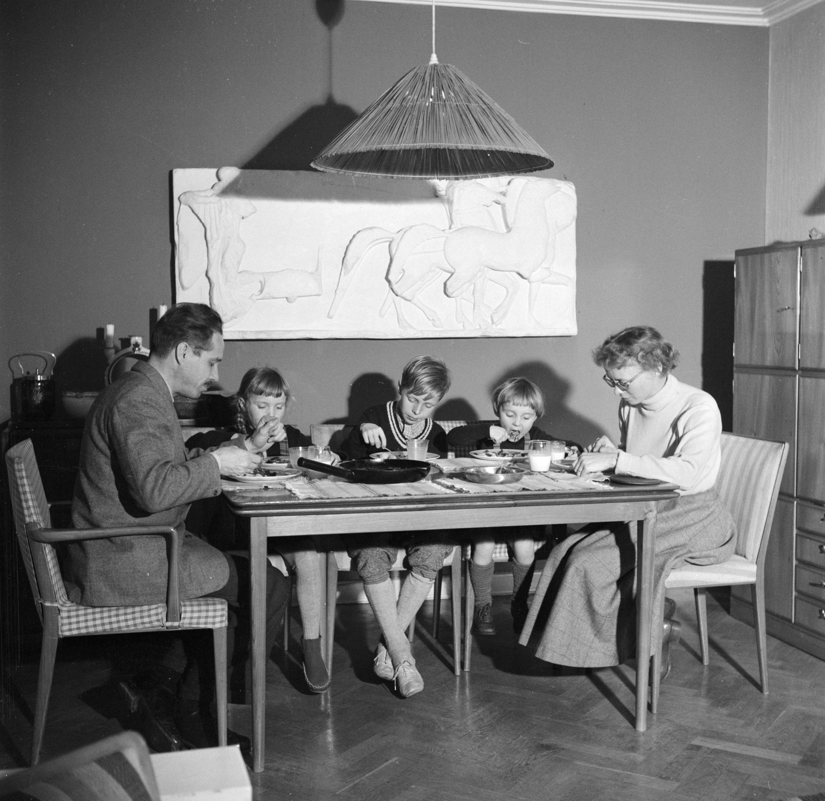 Collectie / Archief : Fotocollectie Van de Poll Reportage / Serie : Dag uit het leven van de familie Svendsen Beschrijving : Het gezin zittend aan de eettafel met de avondmaaltijd Datum : maart 1954 Locatie : Denemarken Trefwoorden : beeldhouwwerken, dagelijks leven, dochters, eters, gezinnen, glaswerk, huiselijkheid, huiskamers, huisraad, interieurs, kinderen, maaltijden, meubilair, moeders, ouders, serviesgoed, thuis, vaders, woningen, zonen Persoonsnaam : Svendsen, [...] Fotograaf : Poll, Willem van de, [onbekend] Auteursrechthebbende : Nationaal Archief Materiaalsoort : Negatief (zwart/wit) Nummer archiefinventaris : bekijk toegang 2.24.14.02 Bestanddeelnummer : 252-8766